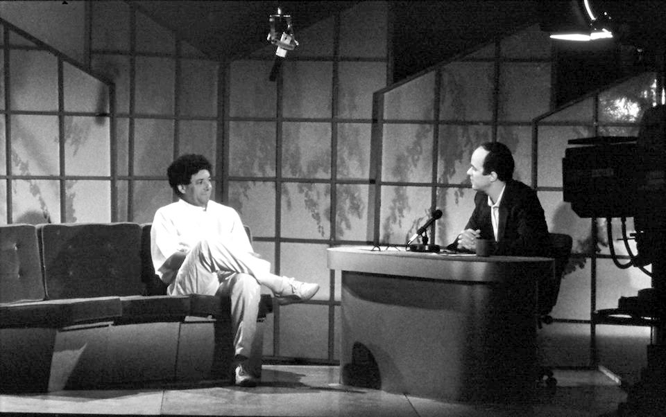 סיבה למסיבה מני פאר וליאור ייני